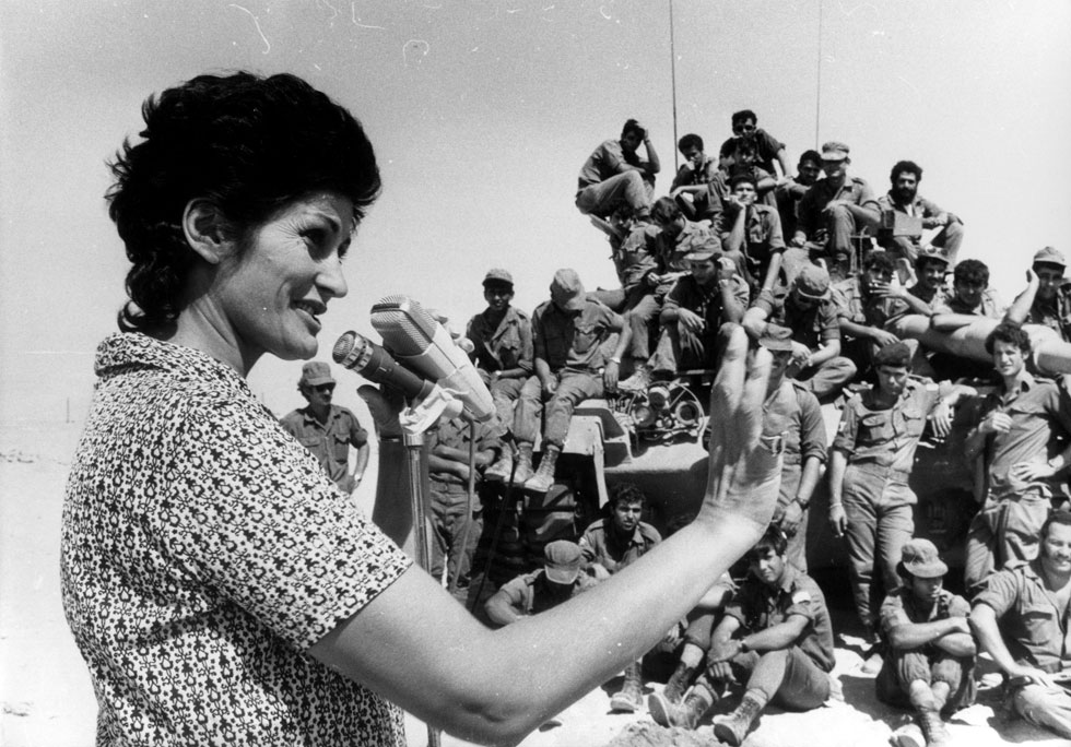 הזמרת יפה ירקוני בהופעה מול חיילים בסיני.